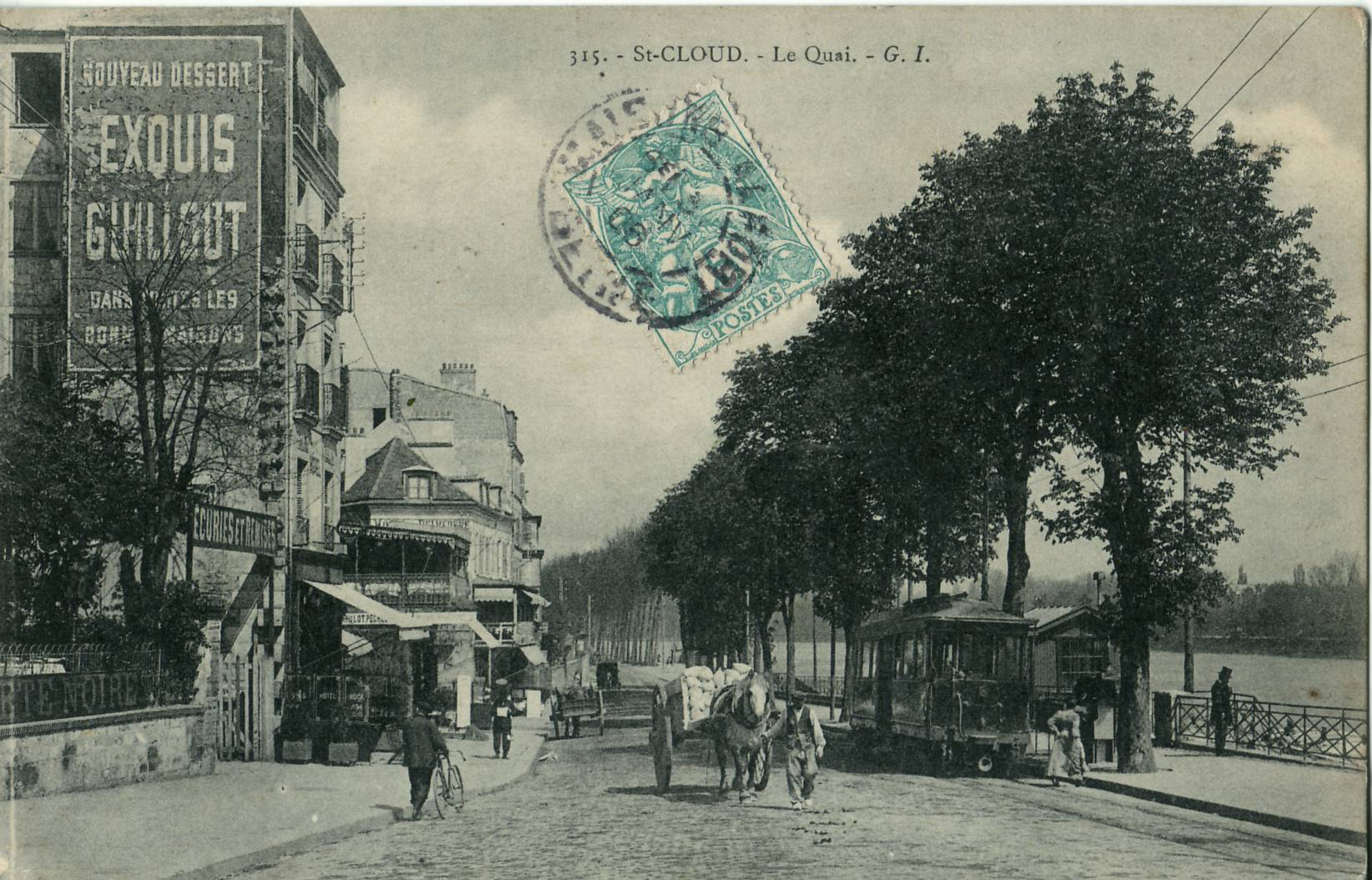 Carte postale ancienne éditée par GI, n°315 :SAINT-CLOUD - Le Quai